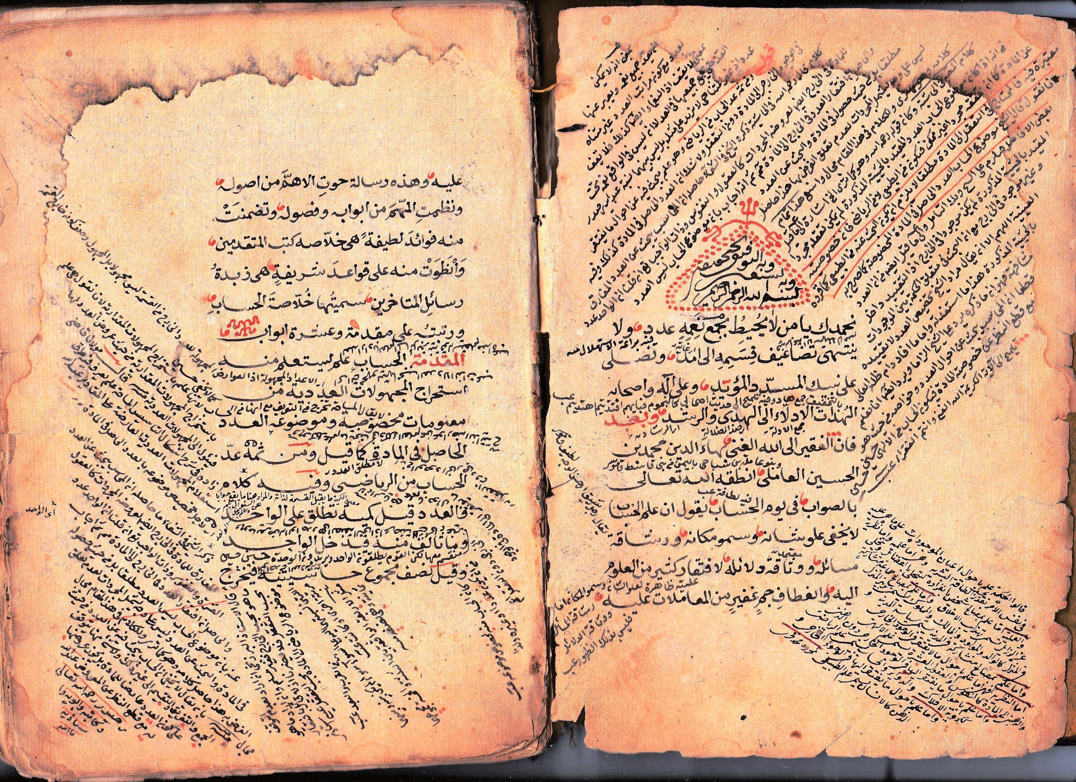 مقدمة كتاب خلاصة الحساب من تأليف بهاء الدين العاملي (المتوفي عام 1035 هجرية) ونسخ المخطوط في عام 1165 هجري/1751م، ولقد اشترى المخطوط واقتناه الشيخ قاسم أفندي المفتي عام 1270 هجري/ 1853م، وعليه ختمه وختم الناسخ على غلاف الكتاب، ثم قرأ الملا قاسم الكتاب على شيخه أبو الهدى عيسى البندنيجي الموضوع ختمه وكتابته في آخر صفحة في المخطوط عام 1271هجري/1854م، وعيسى البندنيجي هو المدرس في المدرسة الداودية ببغداد